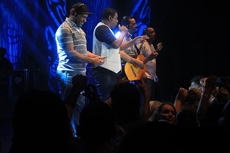 O grupo vocal brasileiro Raça Negra se apresenta em Taguatinga, DF